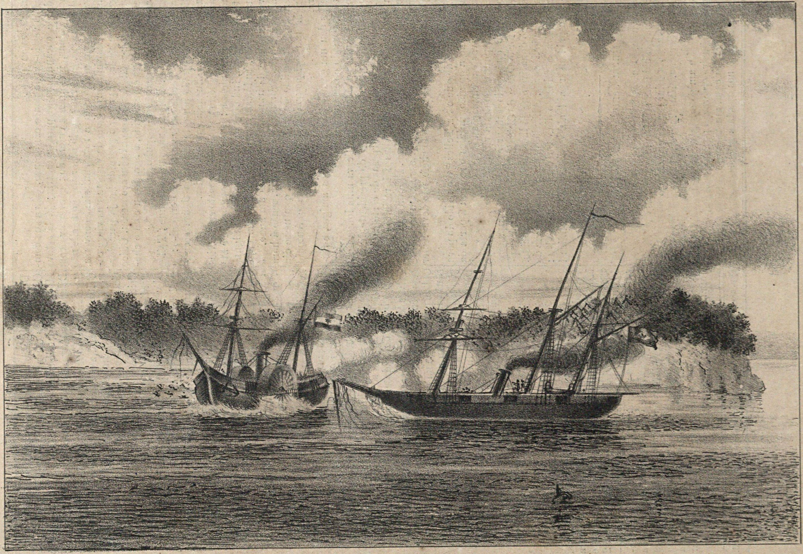 Combate Naval do Riachuelo (11 de junho de 1865): O Vapor Ipiranga, comandado por Álvaro de Carvalho, bate o vapor de guerra paraguaio Saltó (4 horas da tarde).